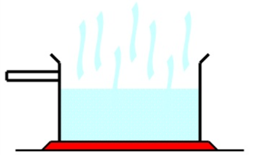 Evaporation